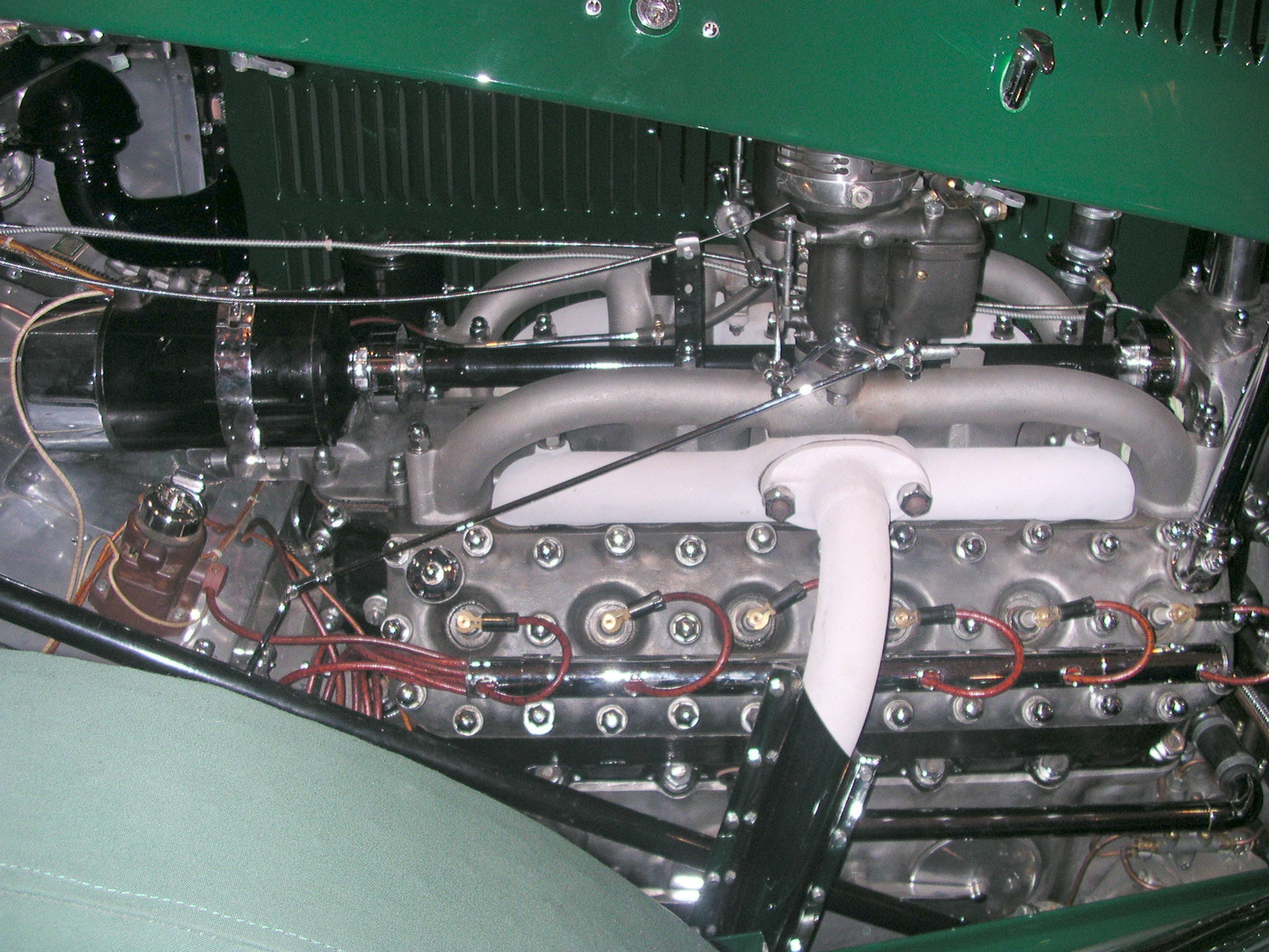 Essen, Technoclassica 2005. Tatra 80, Baujahr 1932, wassergekühlter 12-Zylinder-Motor, 5990 cm³, 88 kW (120 PS), vmax 140 km/h